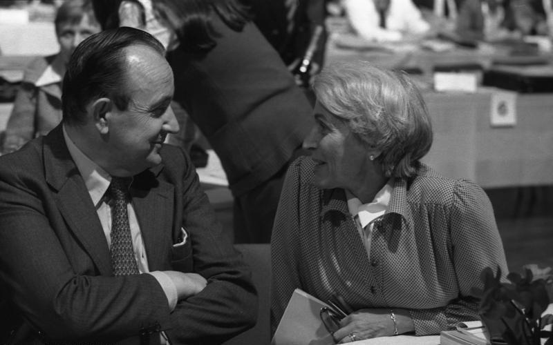 29. Bundesparteitag der F.D.P. in der Rheigold-Halle in Mainz